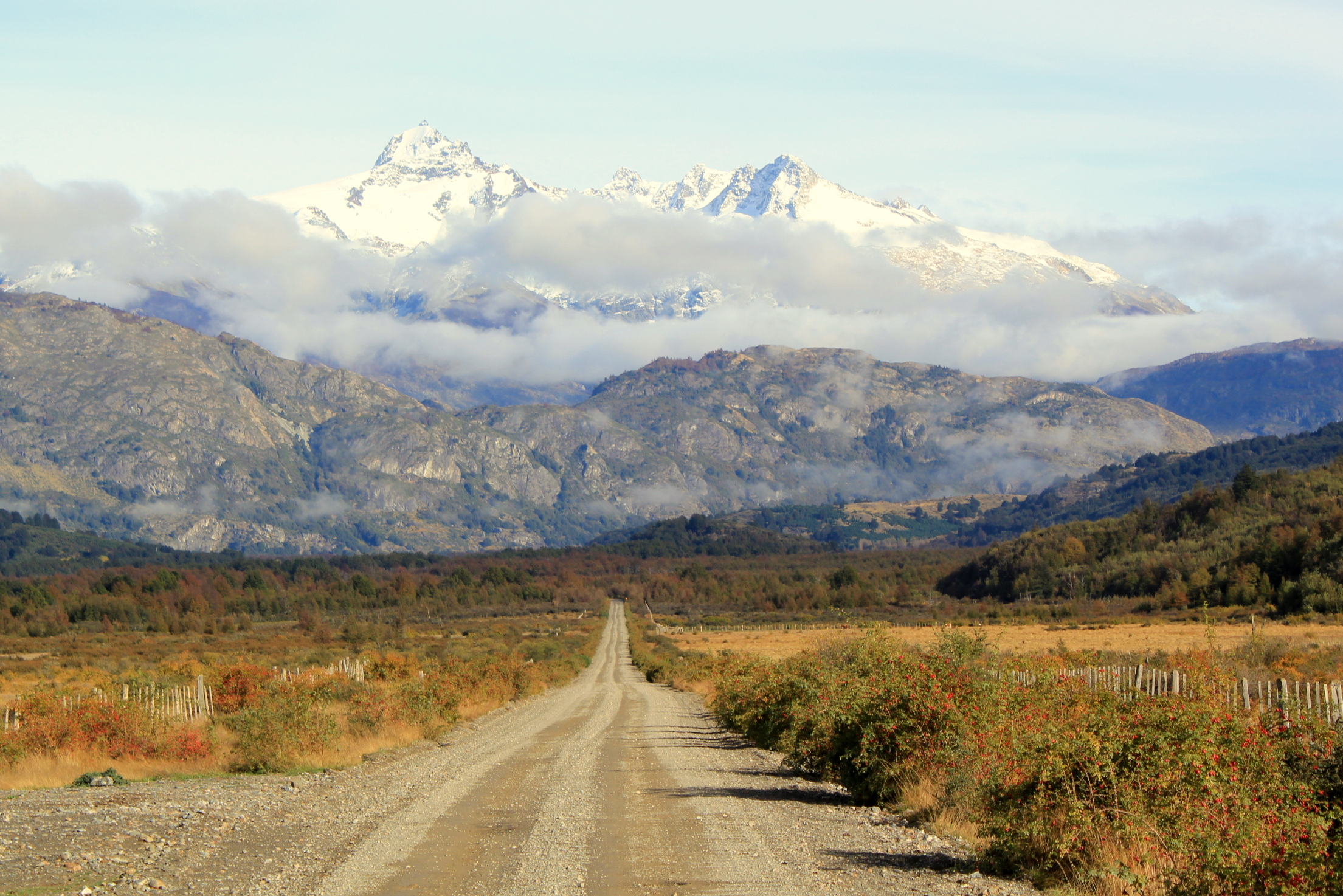 Carretera Austral, Ruta 7, en el sector Leones.